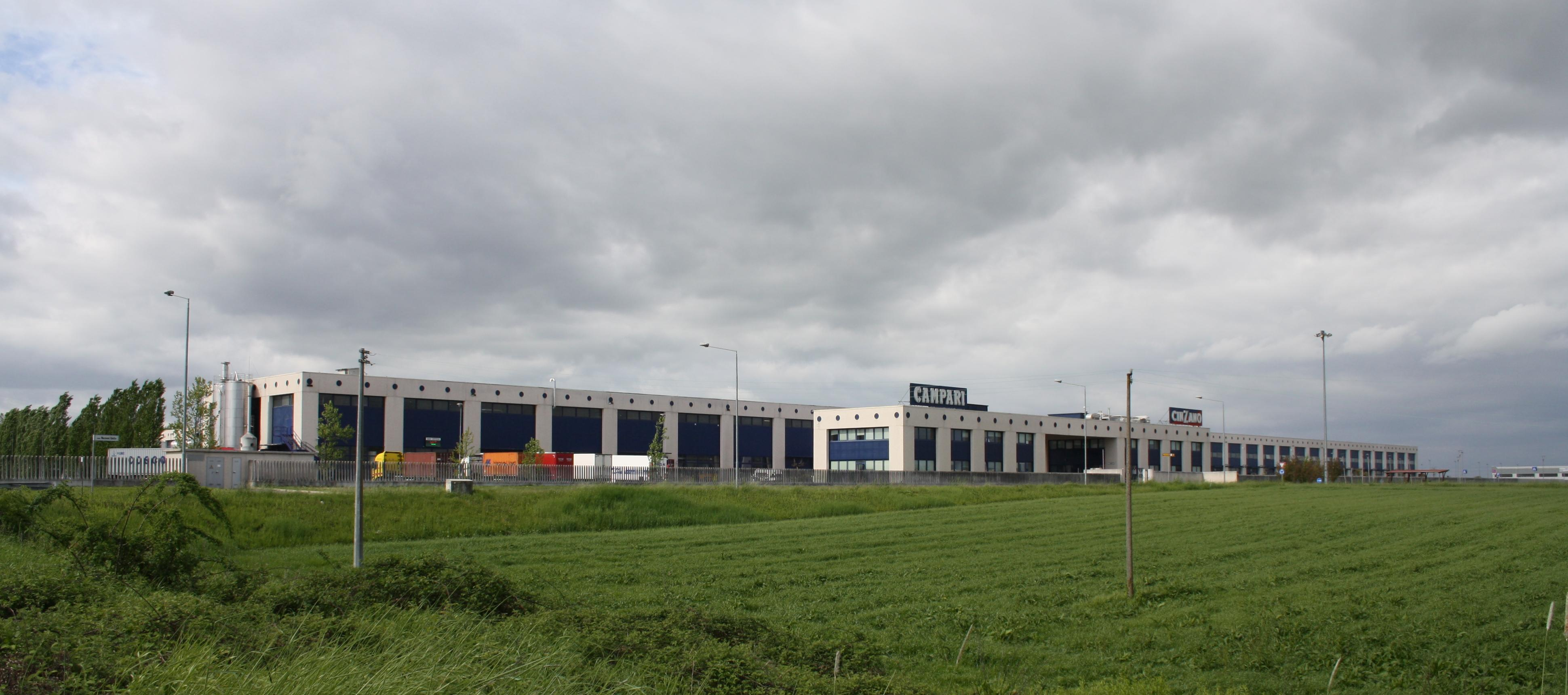 Lo stabilimento della "Campari" a Novi Ligure, situato nei pressi della Strada Provinciale 115.